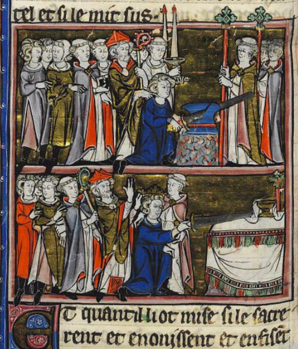 Le jeune Arthur retirant l’épée Excalibur (vignette du haut), puis posant l’épée sur l’autel en signe de soumission à Dieu lors de son couronnement (vignette du bas). Enluminure du manuscrit Histoire de Merlin, 1280 ap. J.-C.. Source : Bibliothèque Nationale de France. Présenté sur la couverture de Arthur et la Table ronde : La force d’une légende, Anne Berthelot, collection « Découvertes Gallimard / Littératures » (n° 298), Éditions Gallimard, 18 novembre 1996.